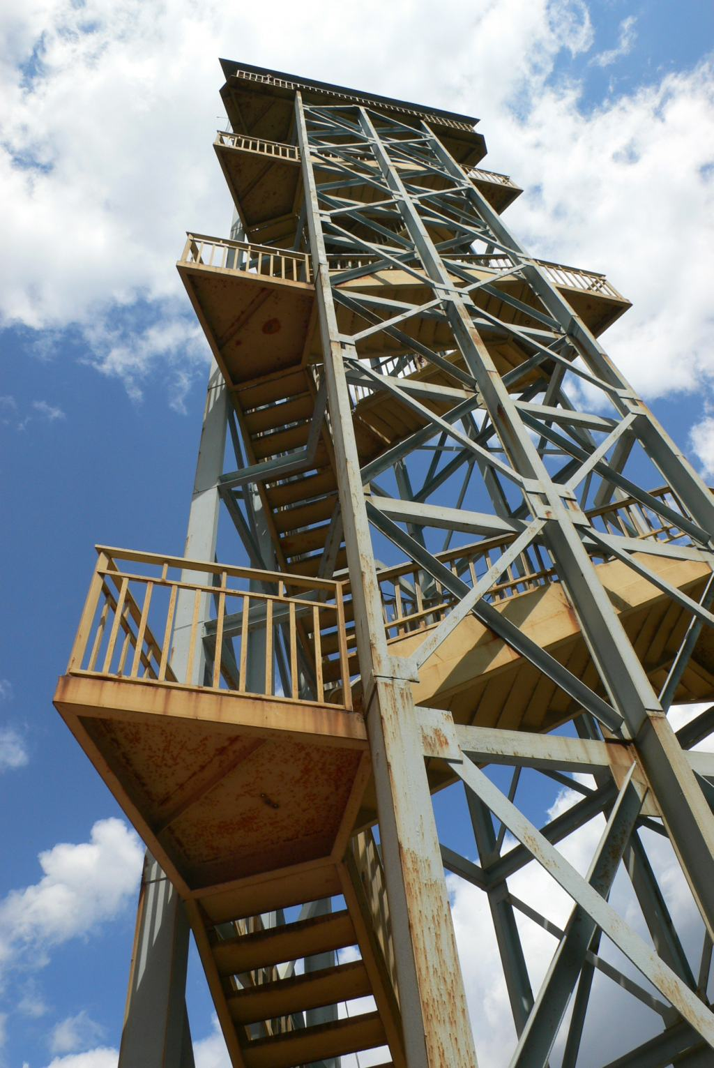 Rozhledna na Svatém Kopečku u Olomouce